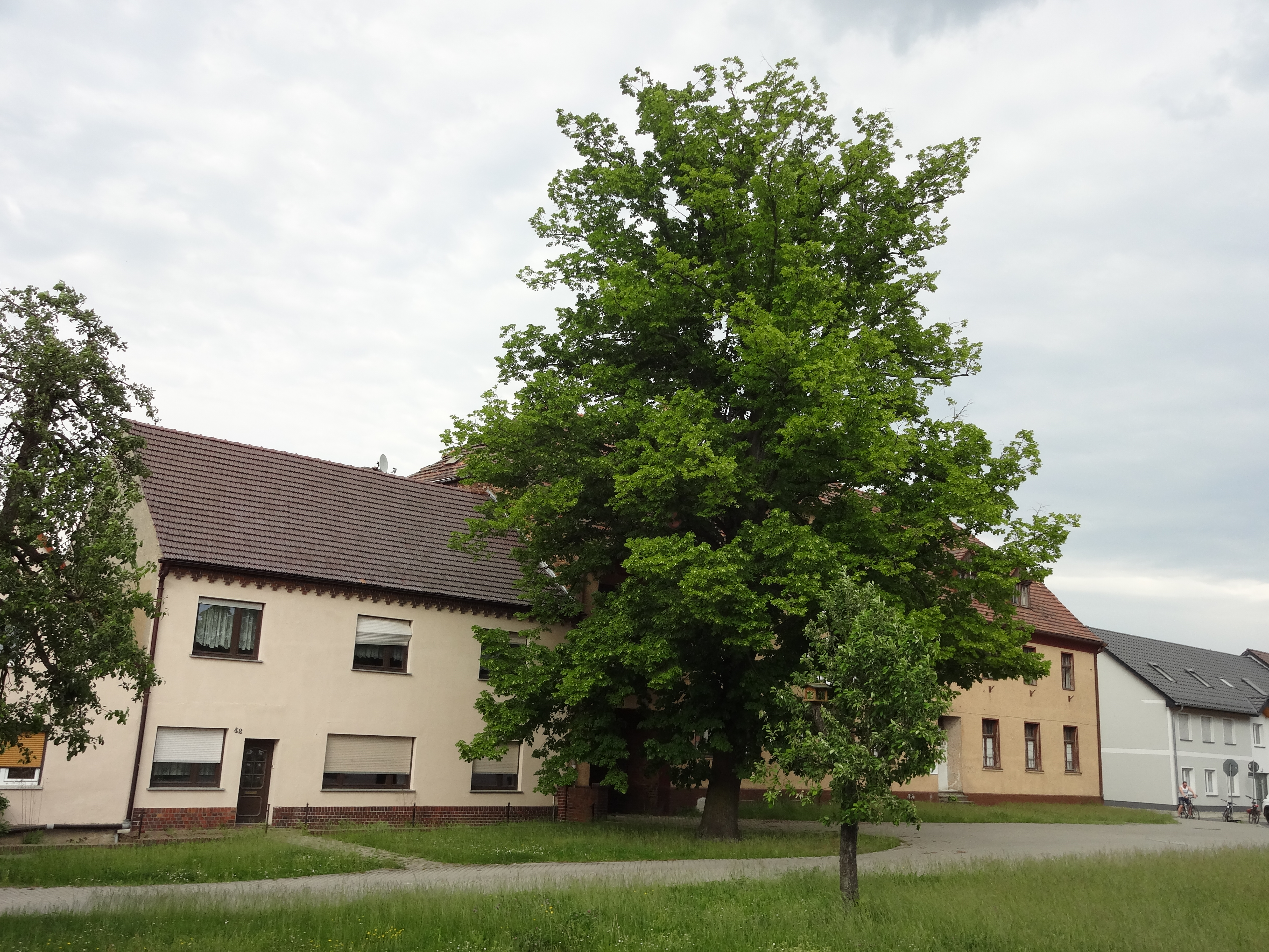 als Naturdenkmal geschützte Sommerlinde vom dem denkmalgeschützten Gasthaus Großkoschen